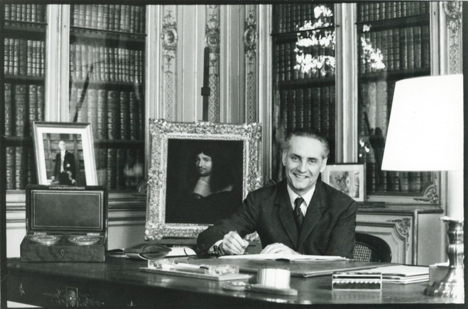 Jean Taittinger Garde des Sceaux